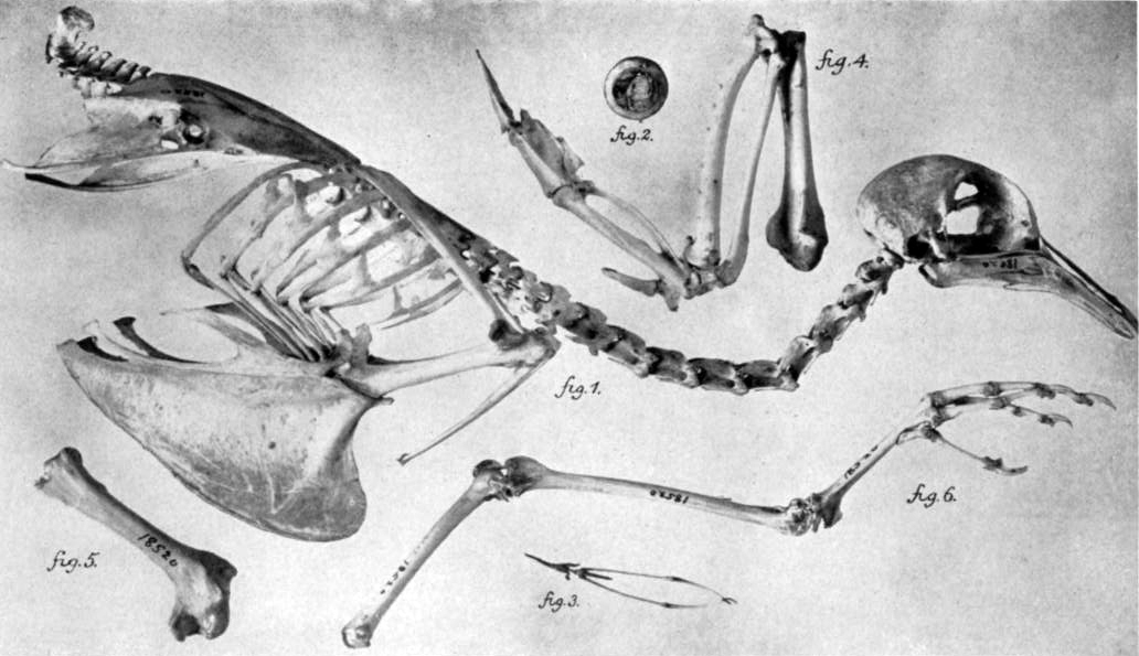 Passenger Pigeon skeleton.